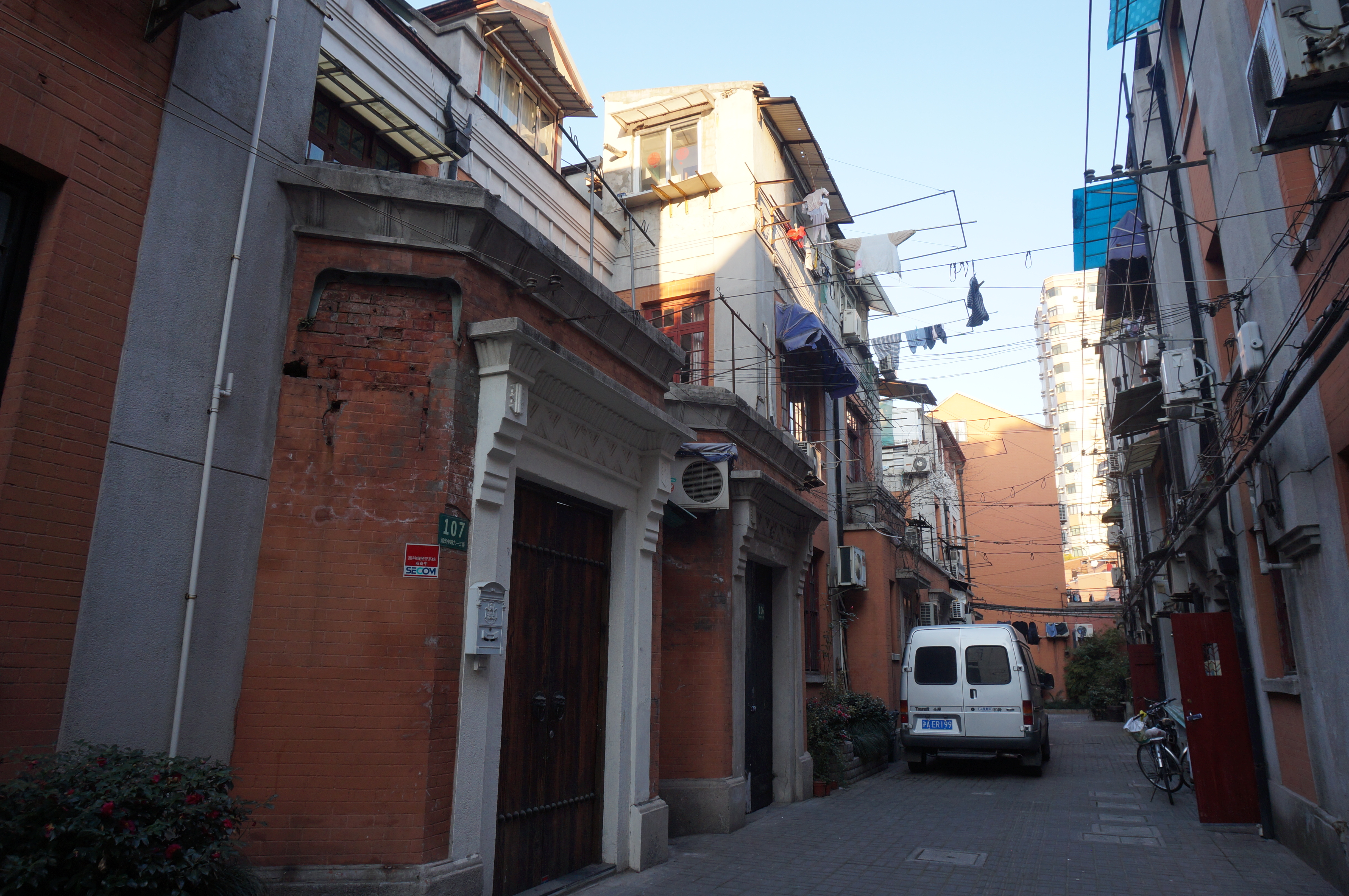 中文（中国大陆）: 上海四明村的一条支弄